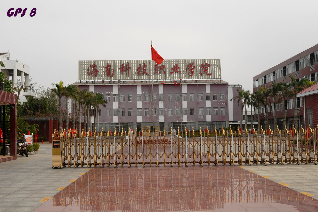 海南科技职业学院（琼山大道18号）2009